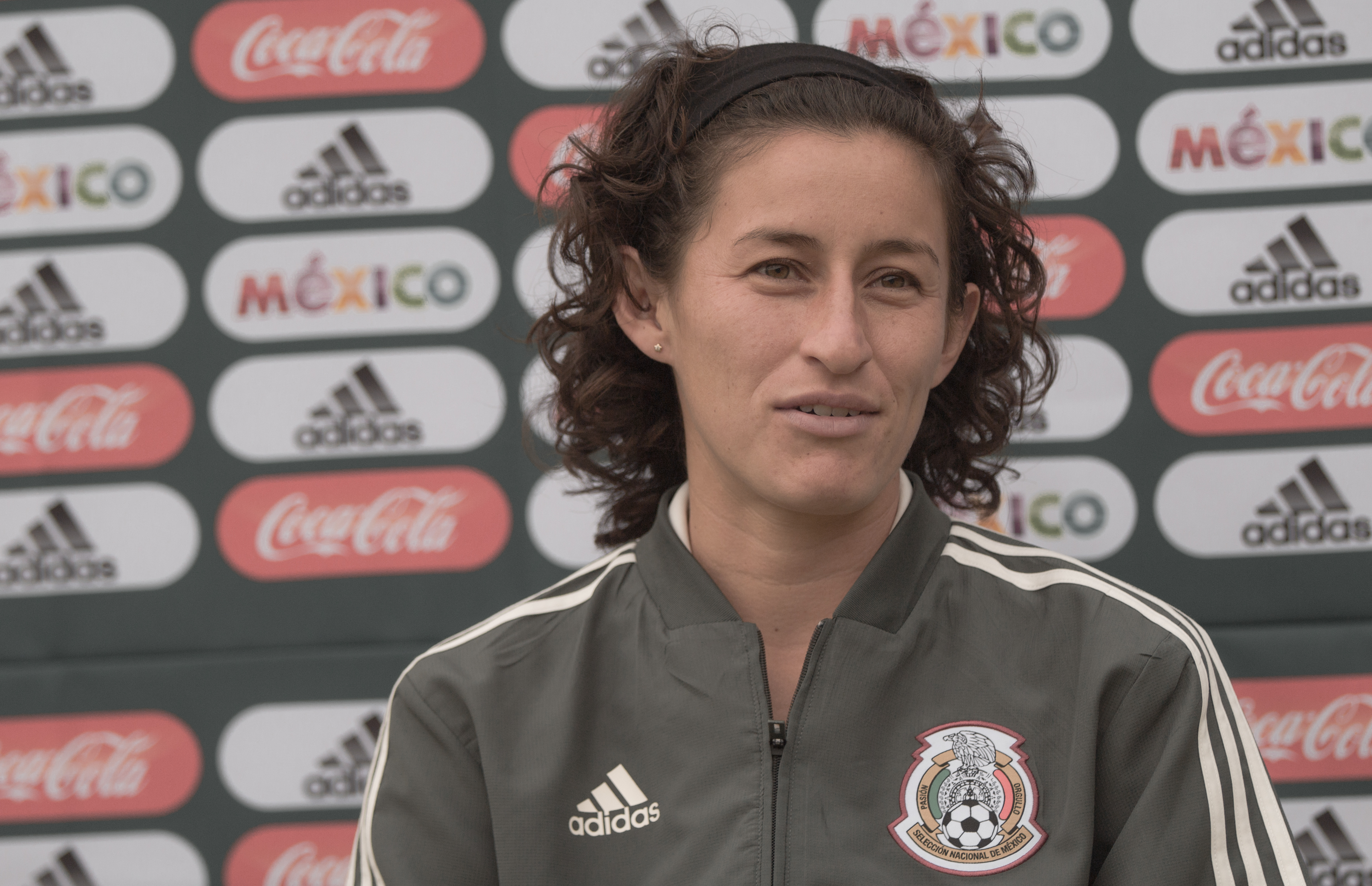 Selección Femenil de Futbol de México.